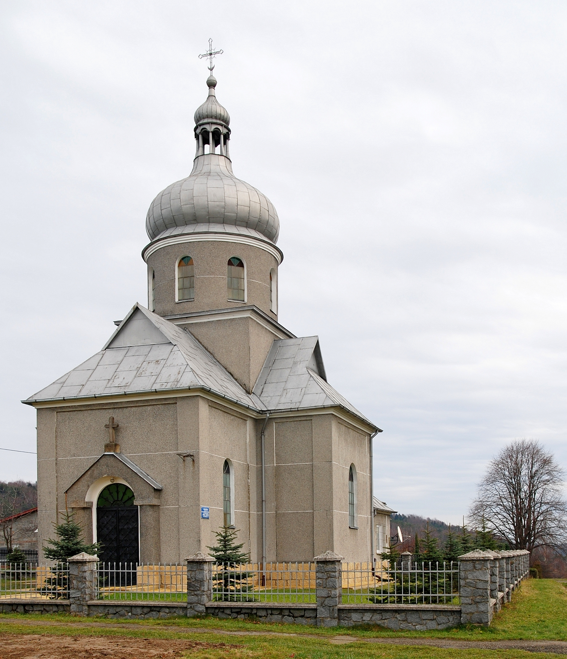 wieś Czarnorzeki